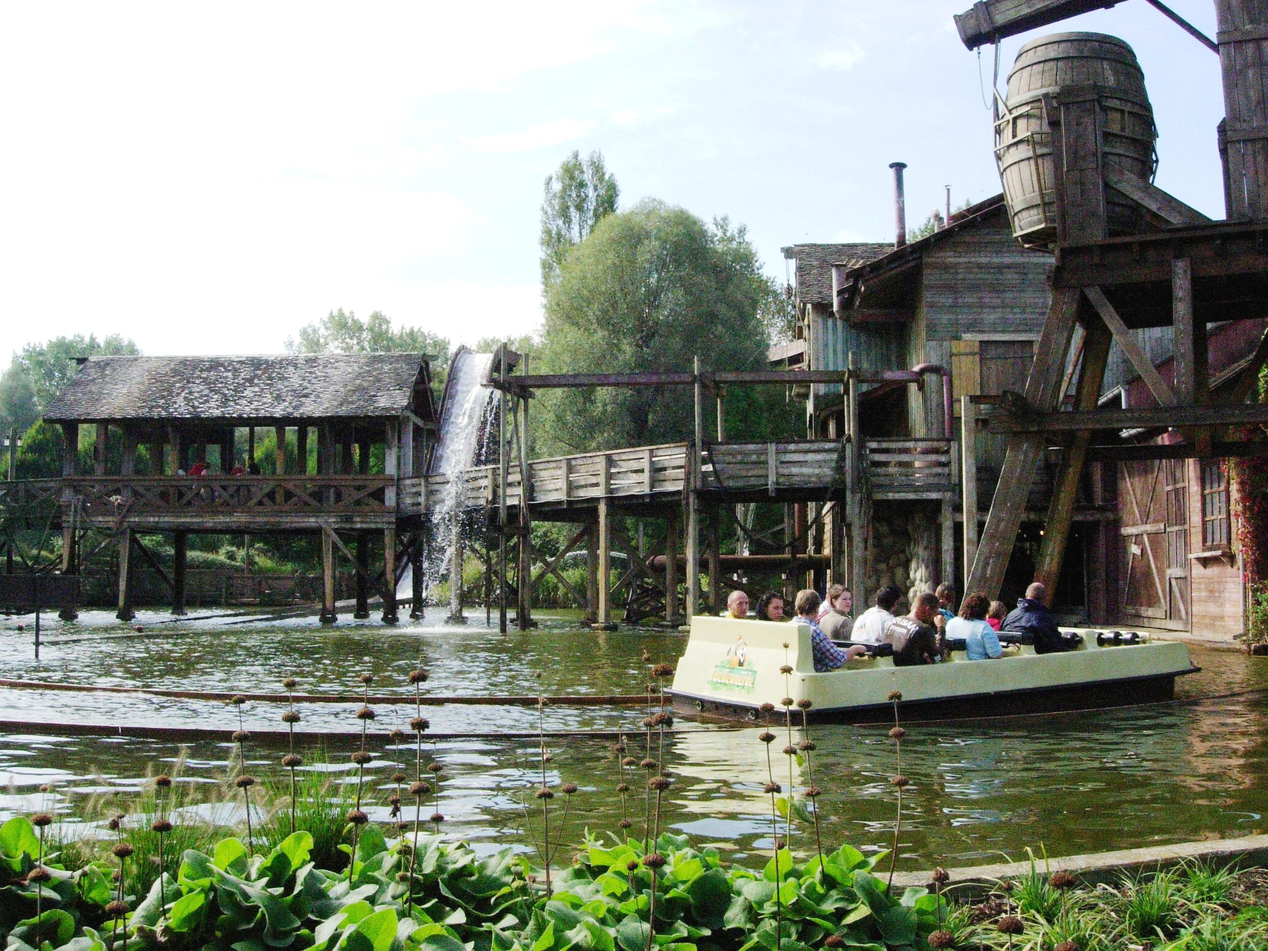 Niagara Bellewaerde